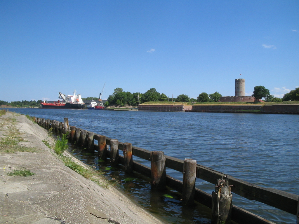 Martwa Wisła, river, Gdansk Wisłoujście, Poland